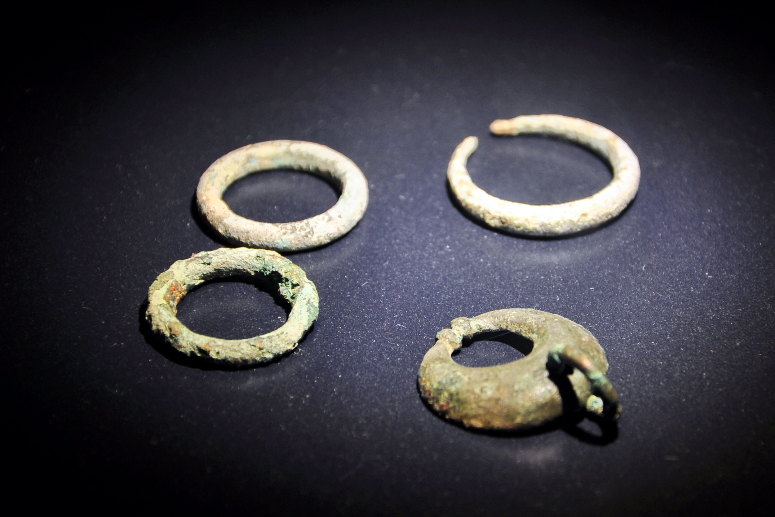 Exponat aus der Thermengasse im einstigen römischen vicus Turicum (Zürich) : Fingerringe und ein halbmondförmiger Anhänger aus Bronze. Die Fundstücke stammen aus Schichten beider Bäder. (gemäss Beschriftung in der Vitrine)